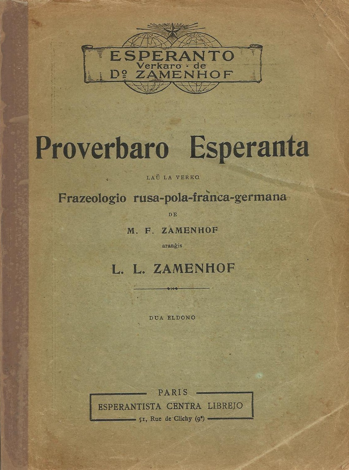 Proverbaro Esperanto